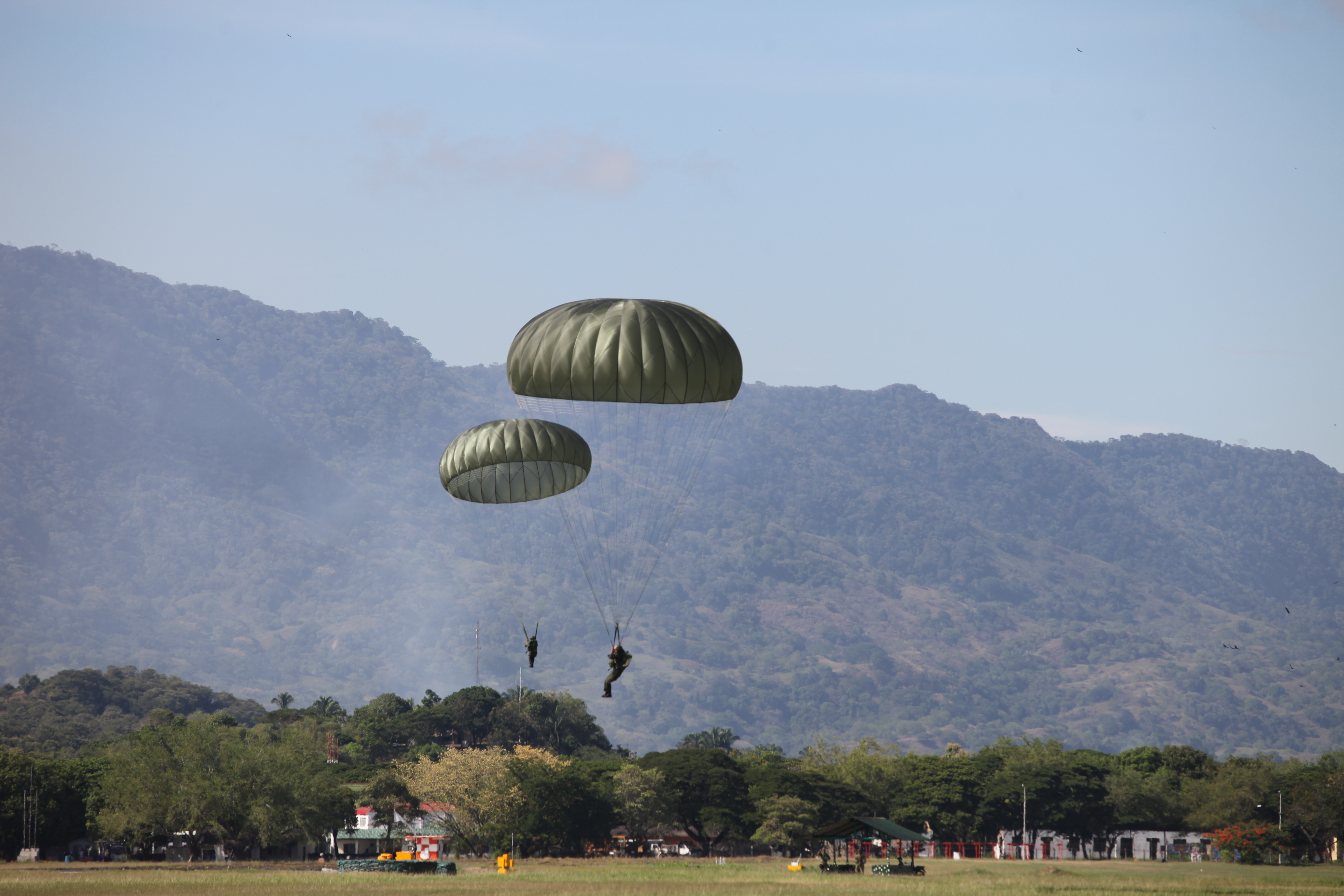 En el Centro de Instrucción Militar de la Fuerza Área Colombiana (CIMIL), en Puerto Salgar, Cundinamarca, fueron entrenados 50 comandos Jungla de la Dirección de Antinarcóticos en Paracaidismo Militar